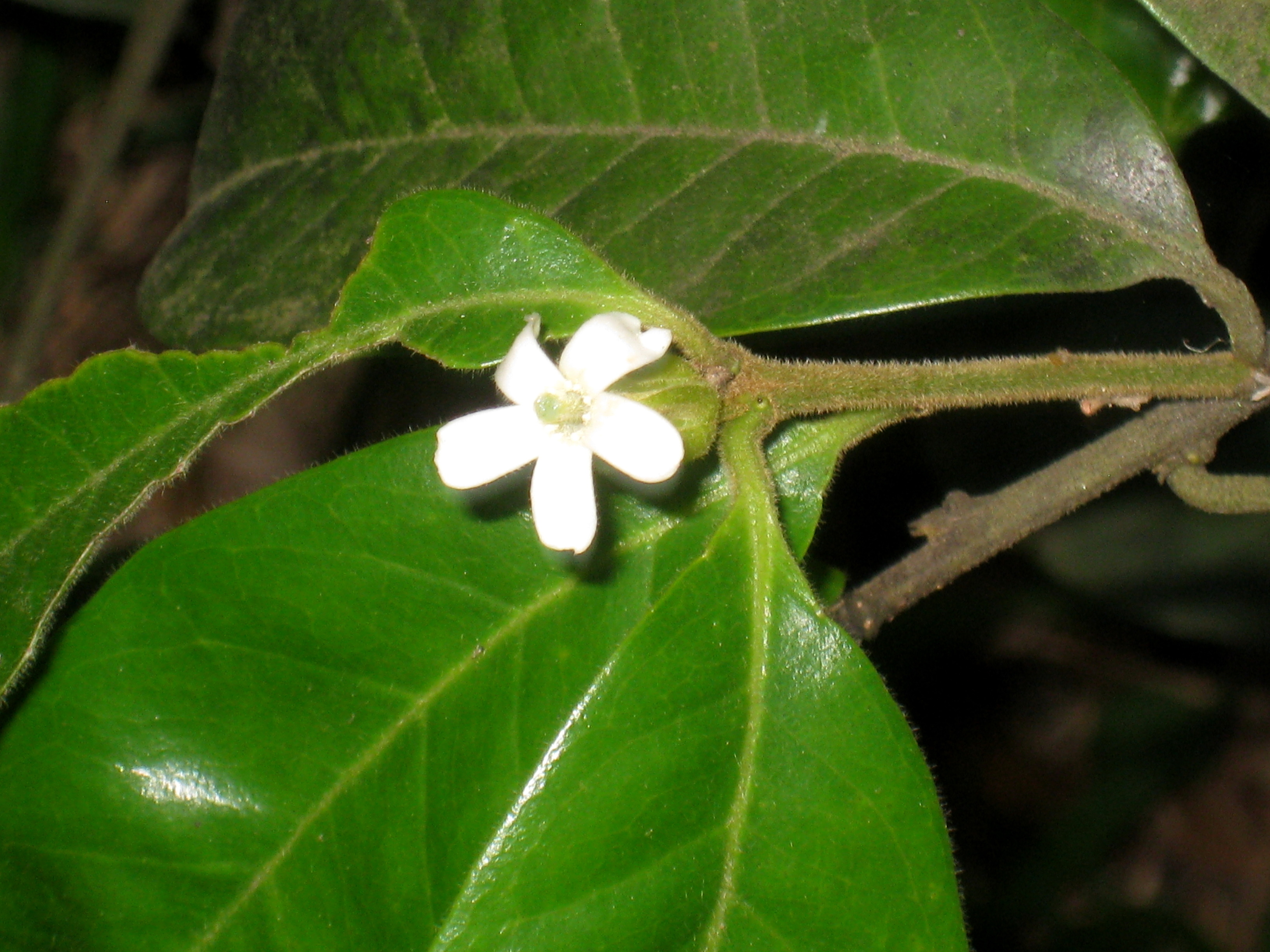 Diclidanthera elliptica in the Jardim Botânico de São Paulo, São Paulo City, SP, Brazil.